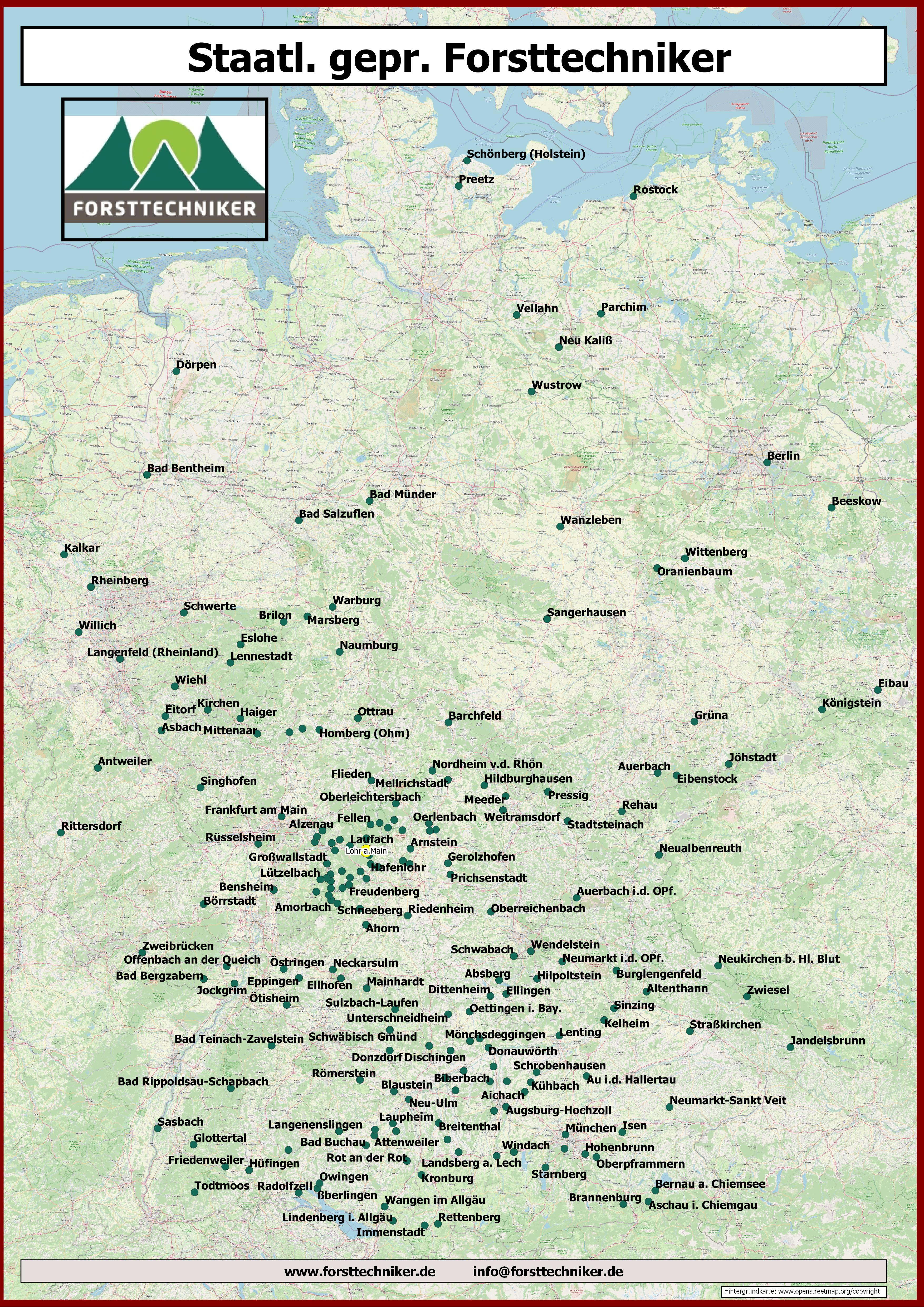 Einsatzorte von Forsttechnikern in der Bundesrepublik Deutschland